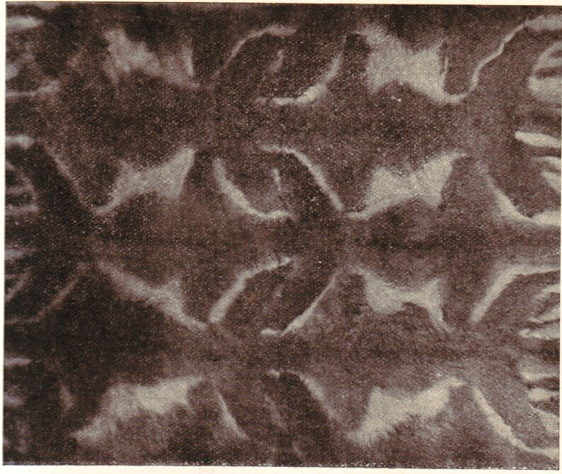 Quillango (carpet) from 8 guanaco fur skins / Quillango aus Guanako. Quillango (Decke) aus 8 Guanakofellen. Arbeit südamerikanischer Indianer. Die Felle (von ungefähr 4 Monate alten Tieren) sind in einer Weise zusammengesetzt, dass der Kopf des einen Felles immer neben den Rumpf des Anderen zu stehen kommt. Zwei Höhen zu vier Fellen. Die weissen Bauchpartien bilden die helle Zeichnung. Alle Näthe sind mit Tiersehnen gemacht. Früher wurde die Lederseite meistens von den Indianern in mosaikartigen Mustern bunt gefärbt. Der Quillango dient den Indianern als Überwurf gegen die Unbill der Witterung.